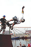 Stalefish, Mike McGill, Scheveningen 1987 Foto door Hans Lucas